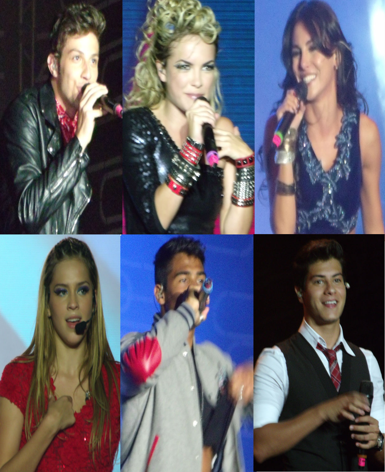 Banda RebeldeS.